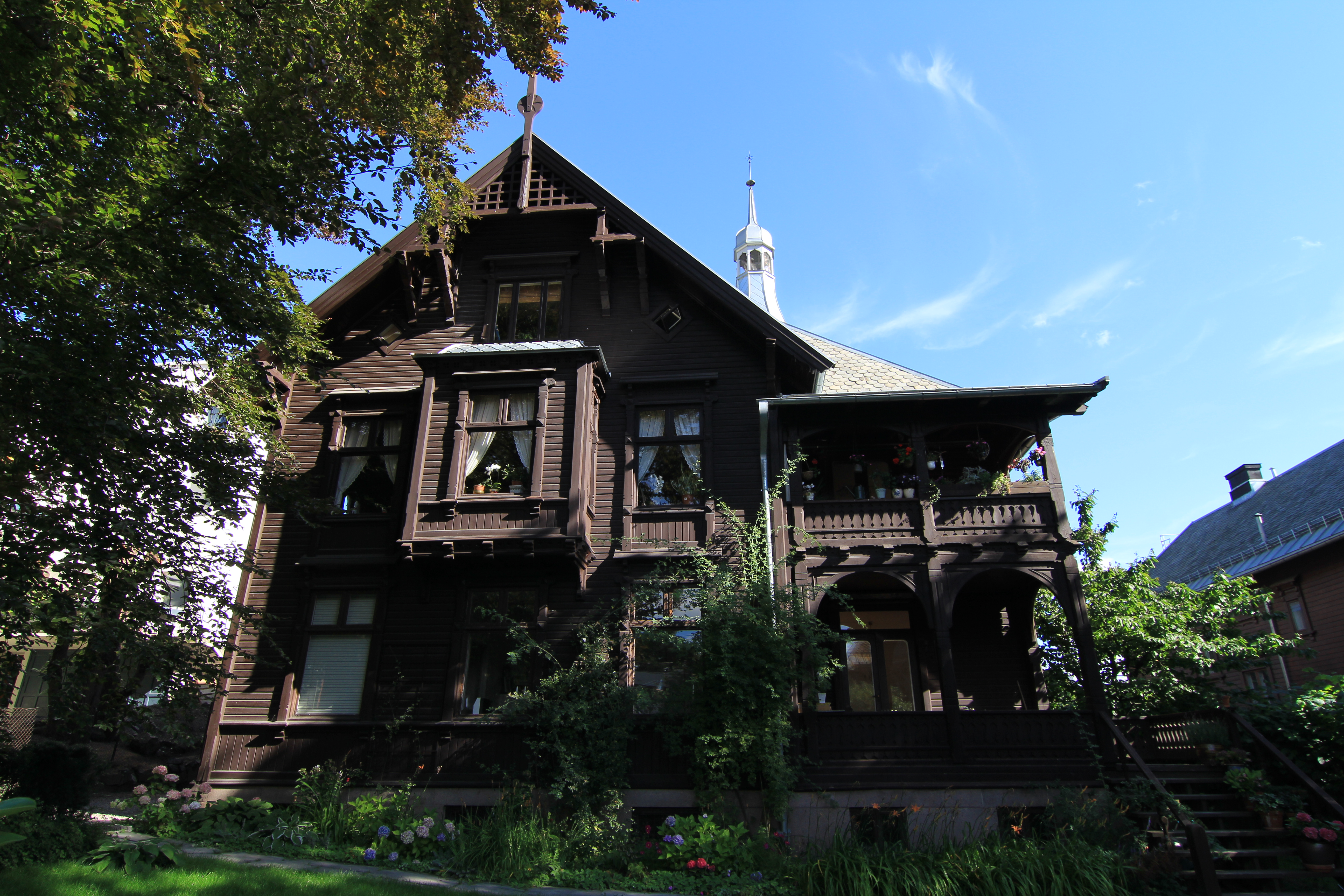 Krusesgt. 5B, Oslo